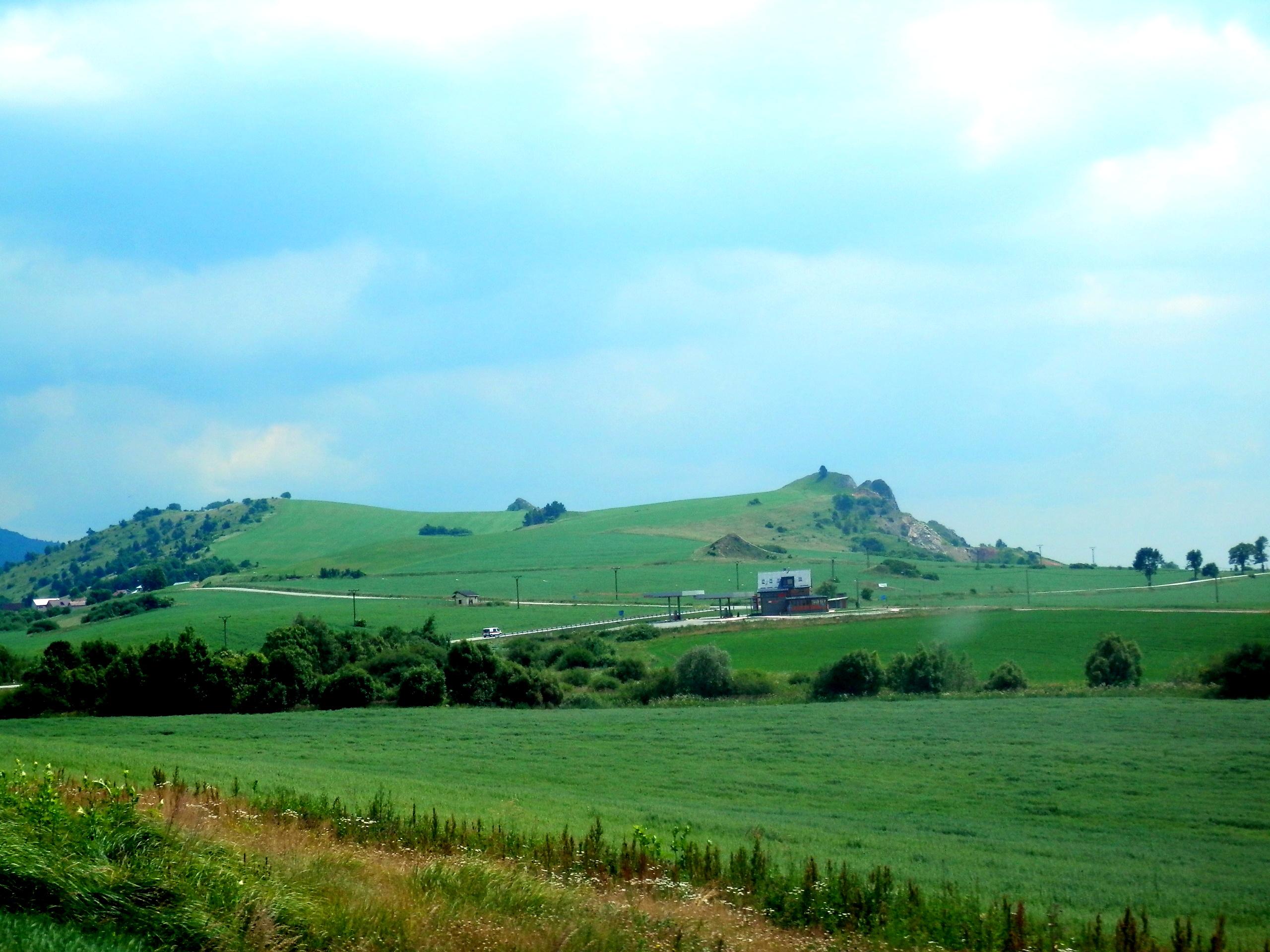 Okolitá príroda pri obci Pusté Pole. Okres Stará Ľubovňa